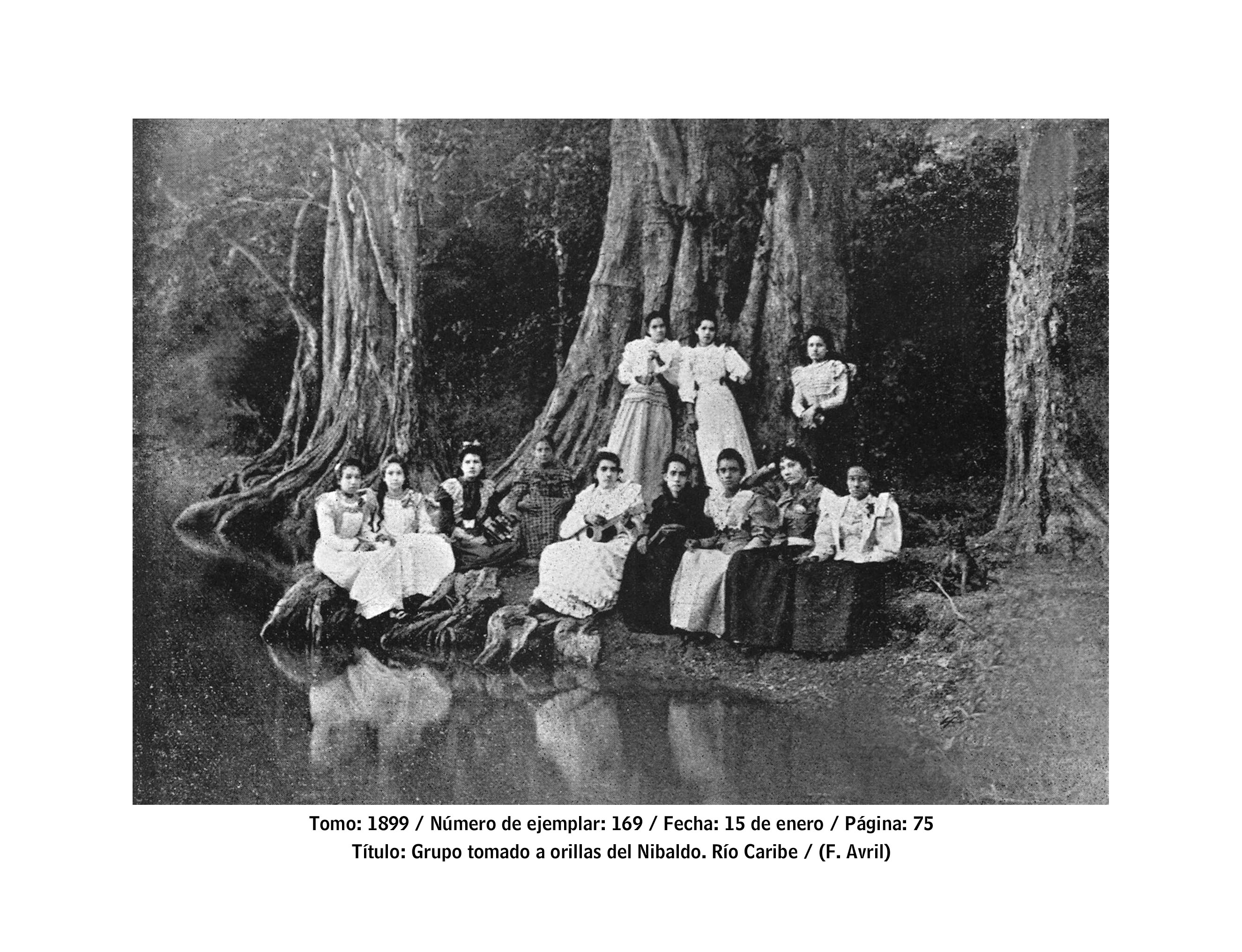 Grupo de mujeres a la orilla del rio Nibaldo. Rio Caribe